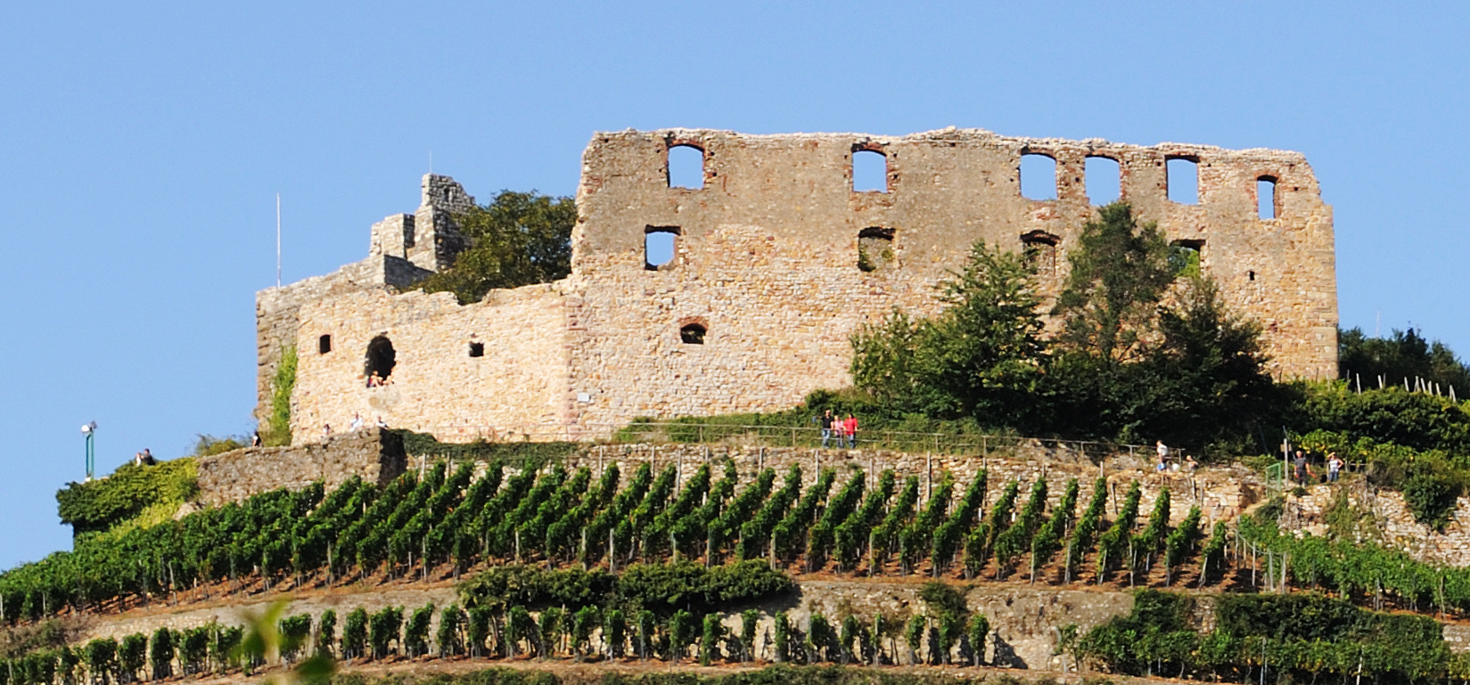 Burgruine Staufen